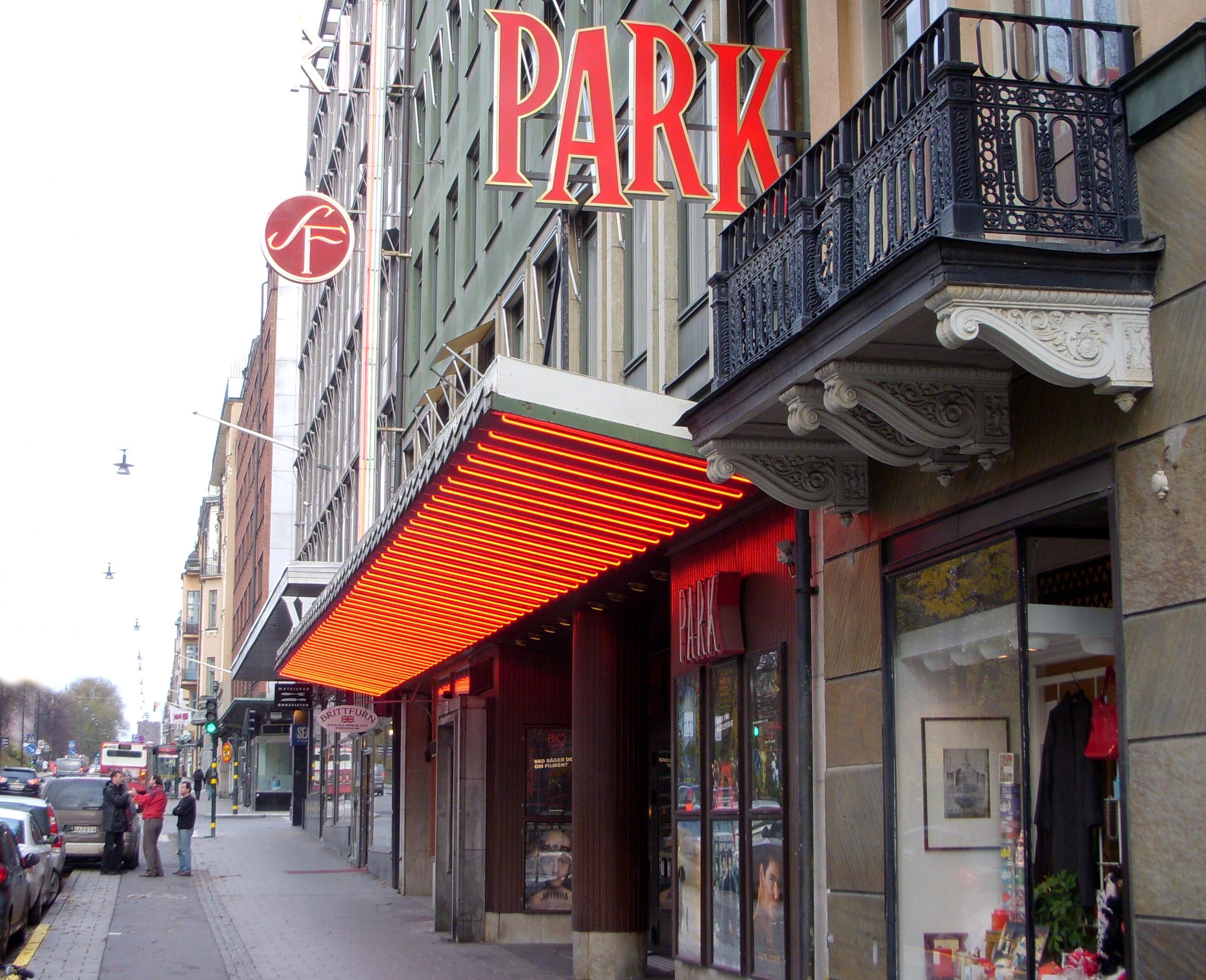 Biografen Park på Östermalm, Stockholm